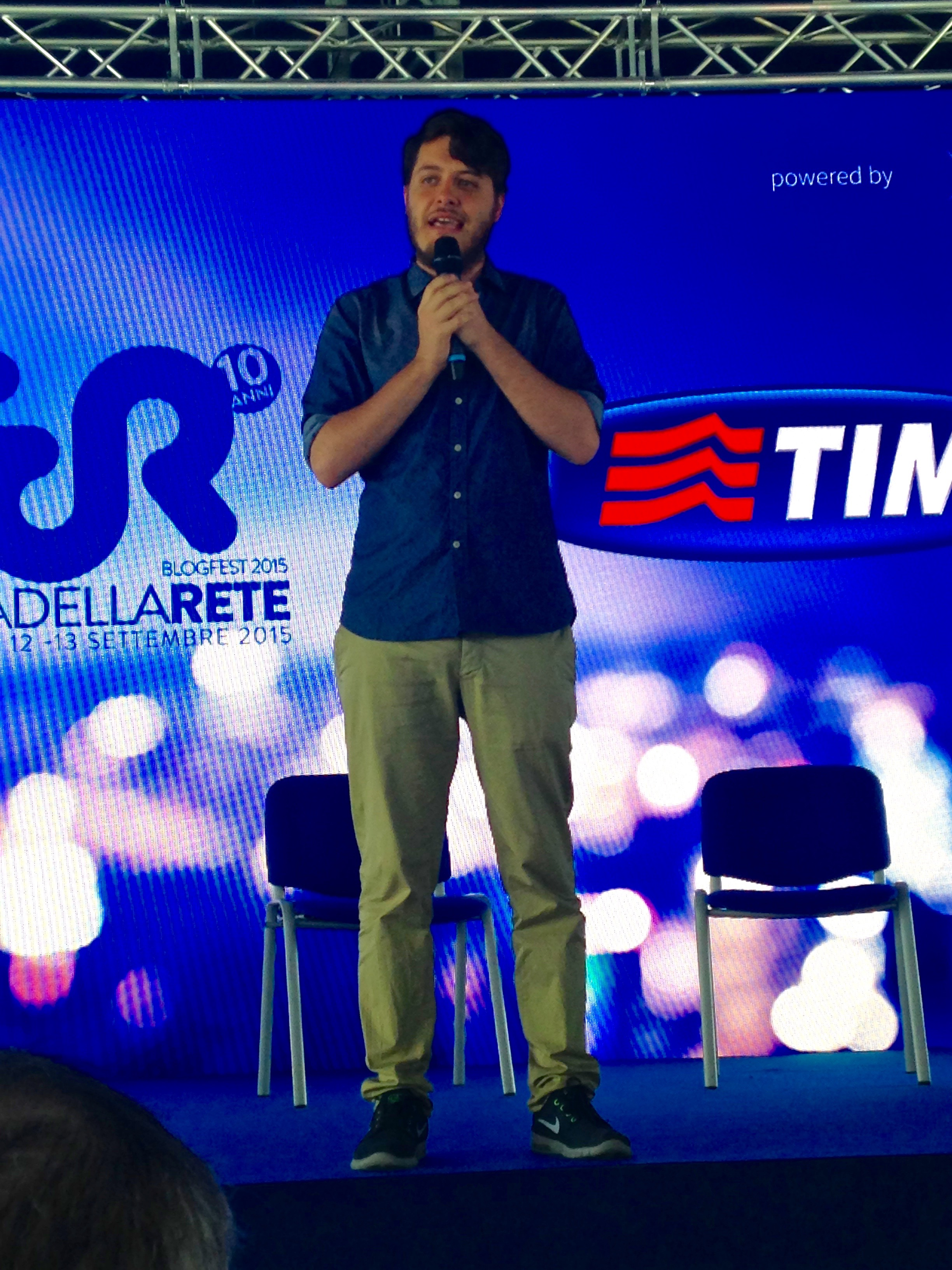 Claudio Di Biagio alla Festa della Rete di Rimini nel 2015